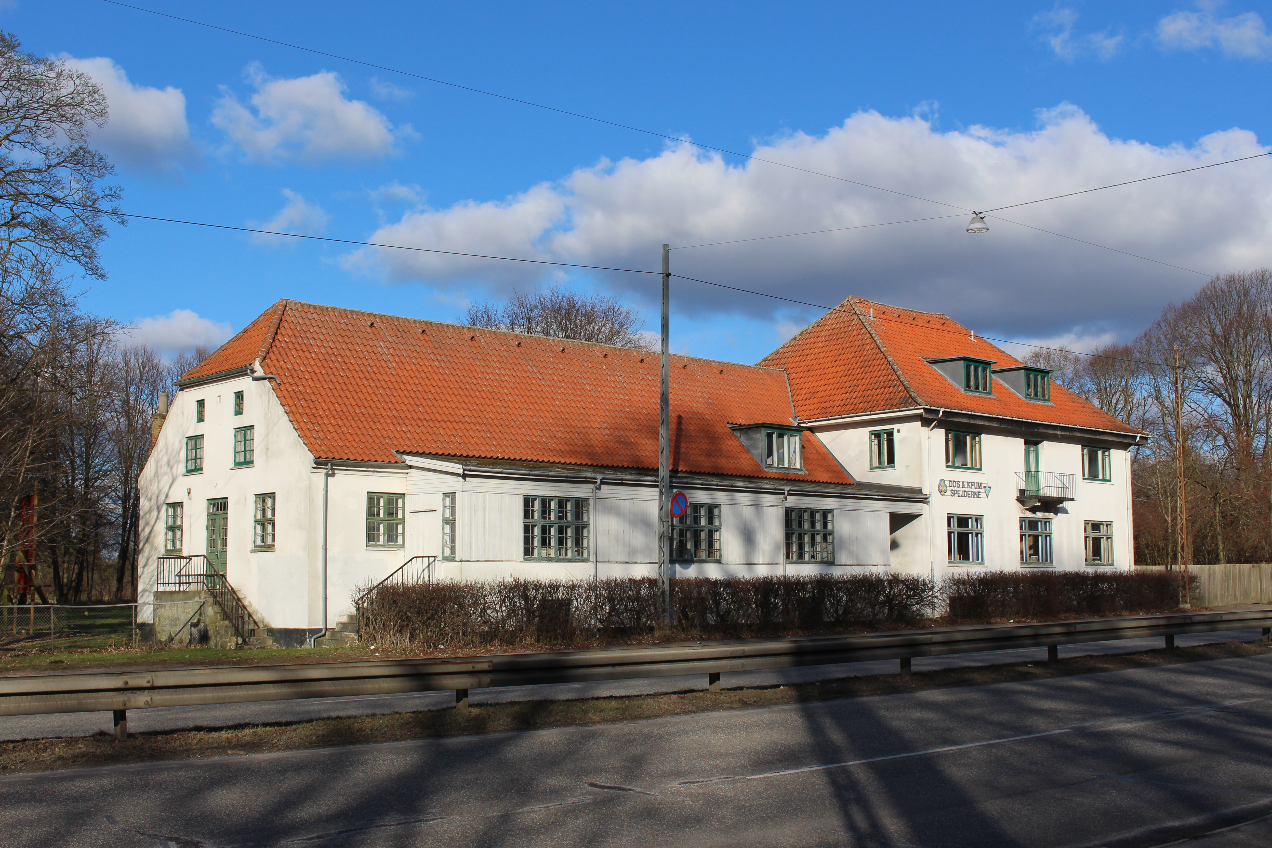 Roskilde Kro i Albertslund